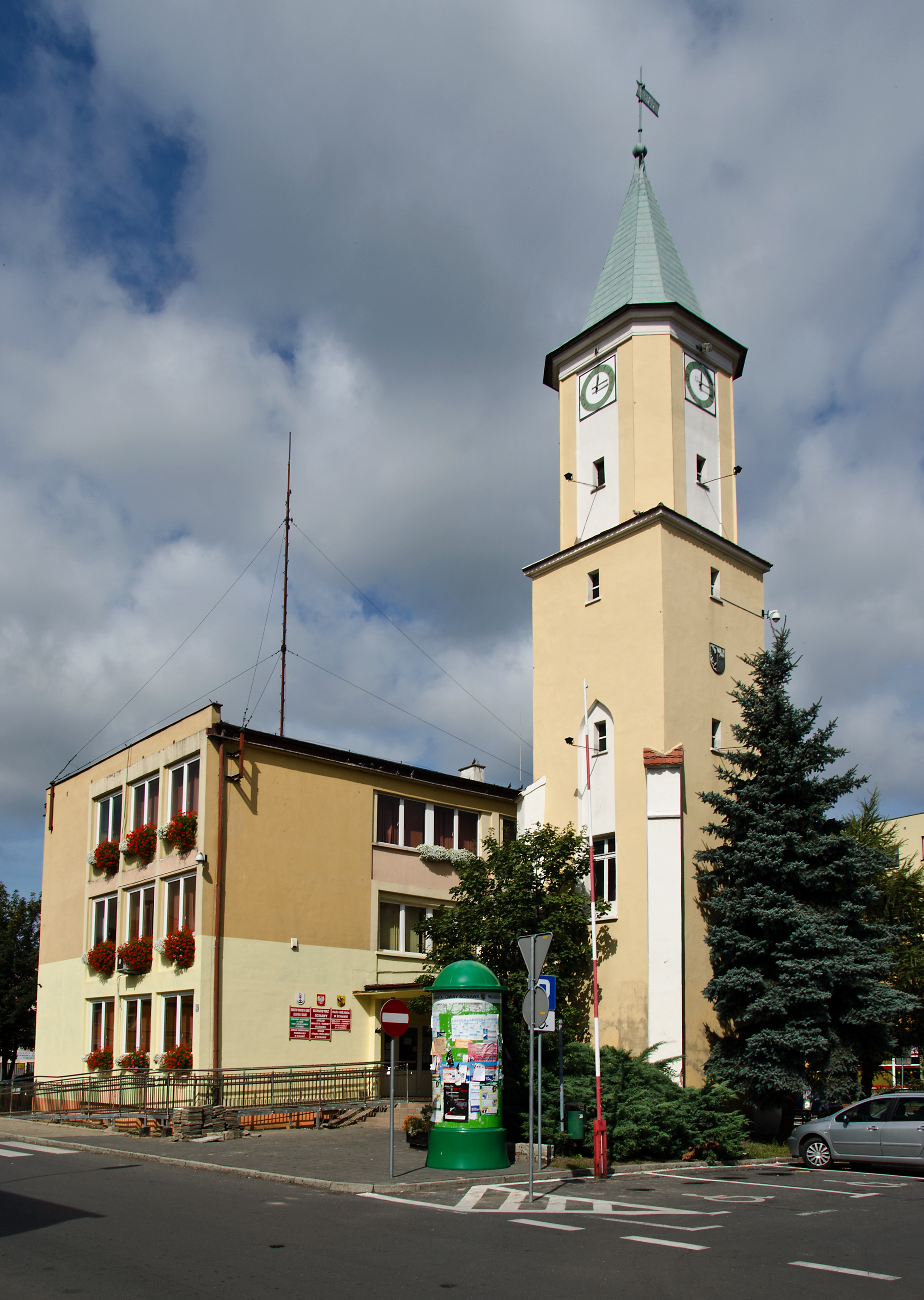 Ścinawa - wieża ratusza (zabytek nr A/3345/1776 z dn. 11.07.66)